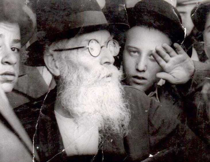 החזון איש, 1952